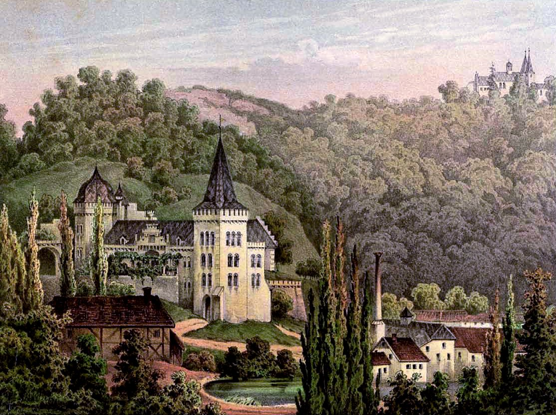 Gut Röderhof und Huysburg, Kreis Aschersleben, Provinz Sachsen